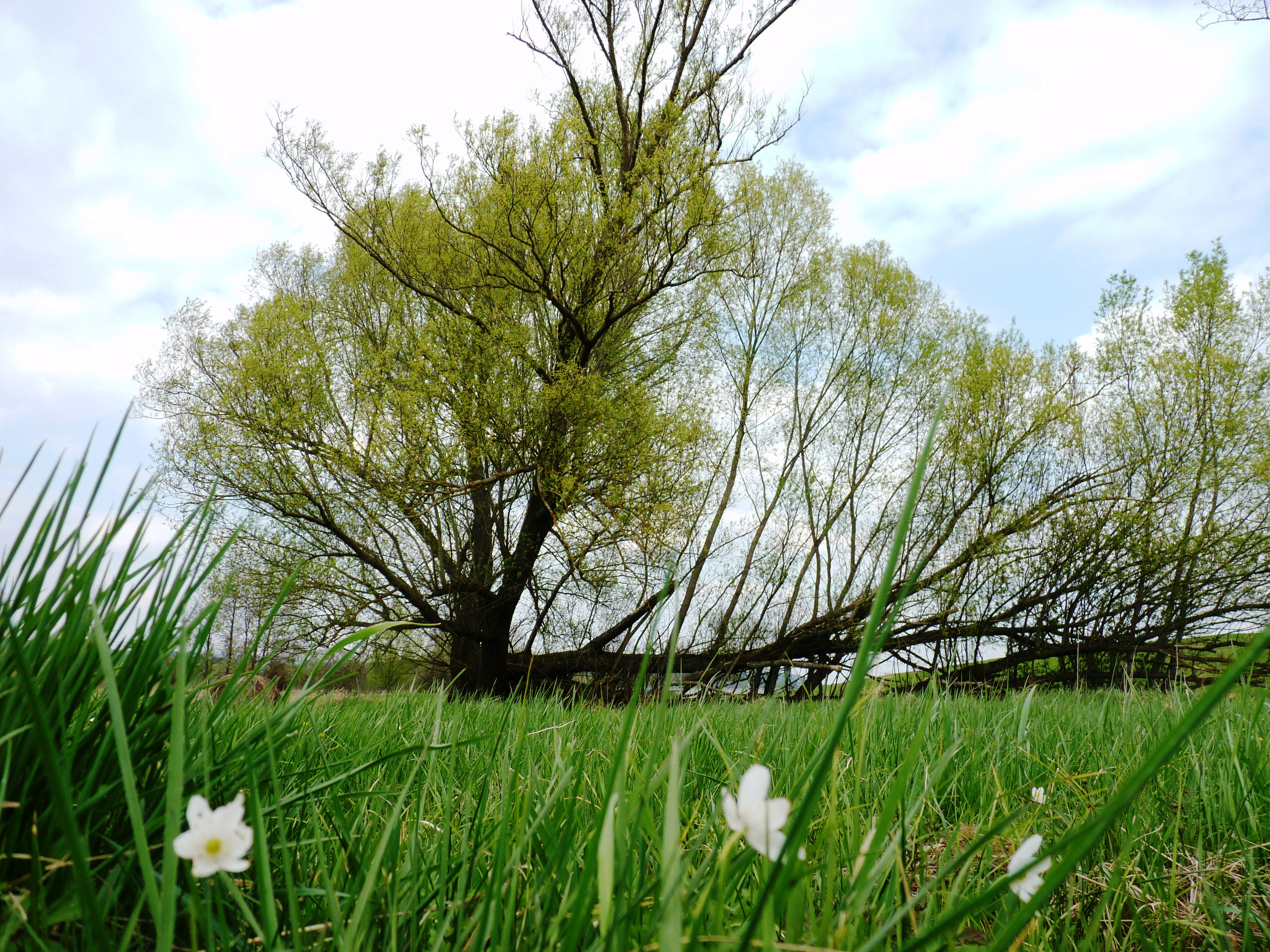 Přírodní památka Chodská Úhlava.